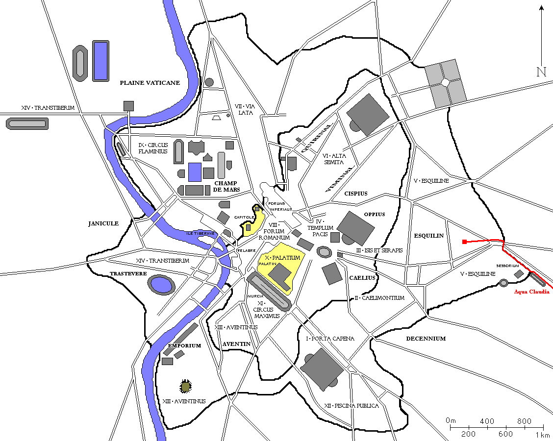 Plan de Rome avec l'aqua Claudia en rouge.